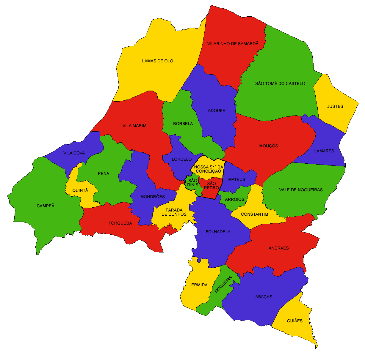 Freguesias do concelho de Vila Real